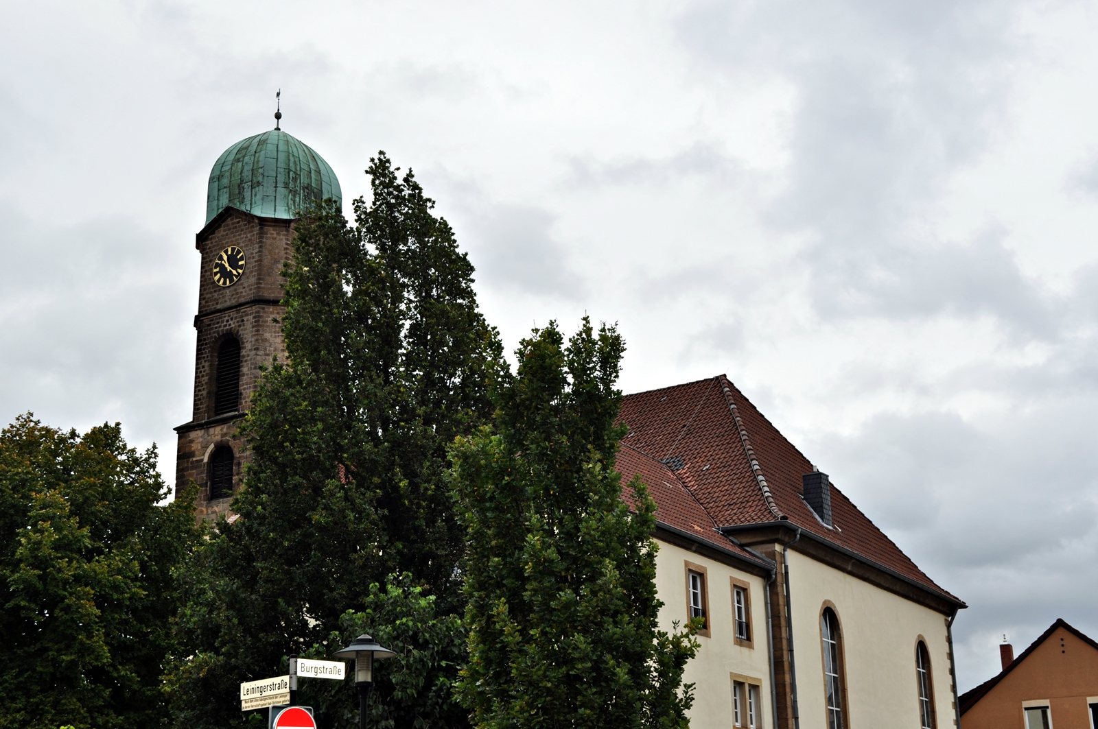 Kirche-Kreuzung Leininger- und Burgstrasse